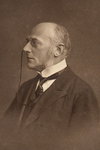 Leopold Heyrovský - otec Jaroslava Heyrovského